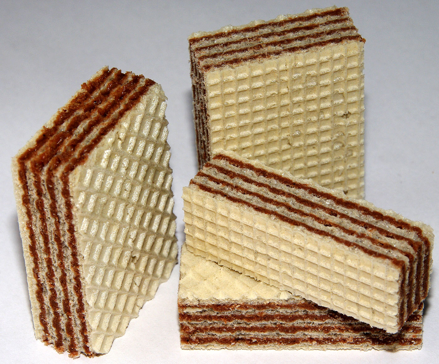 Neapolitaner-Waffel